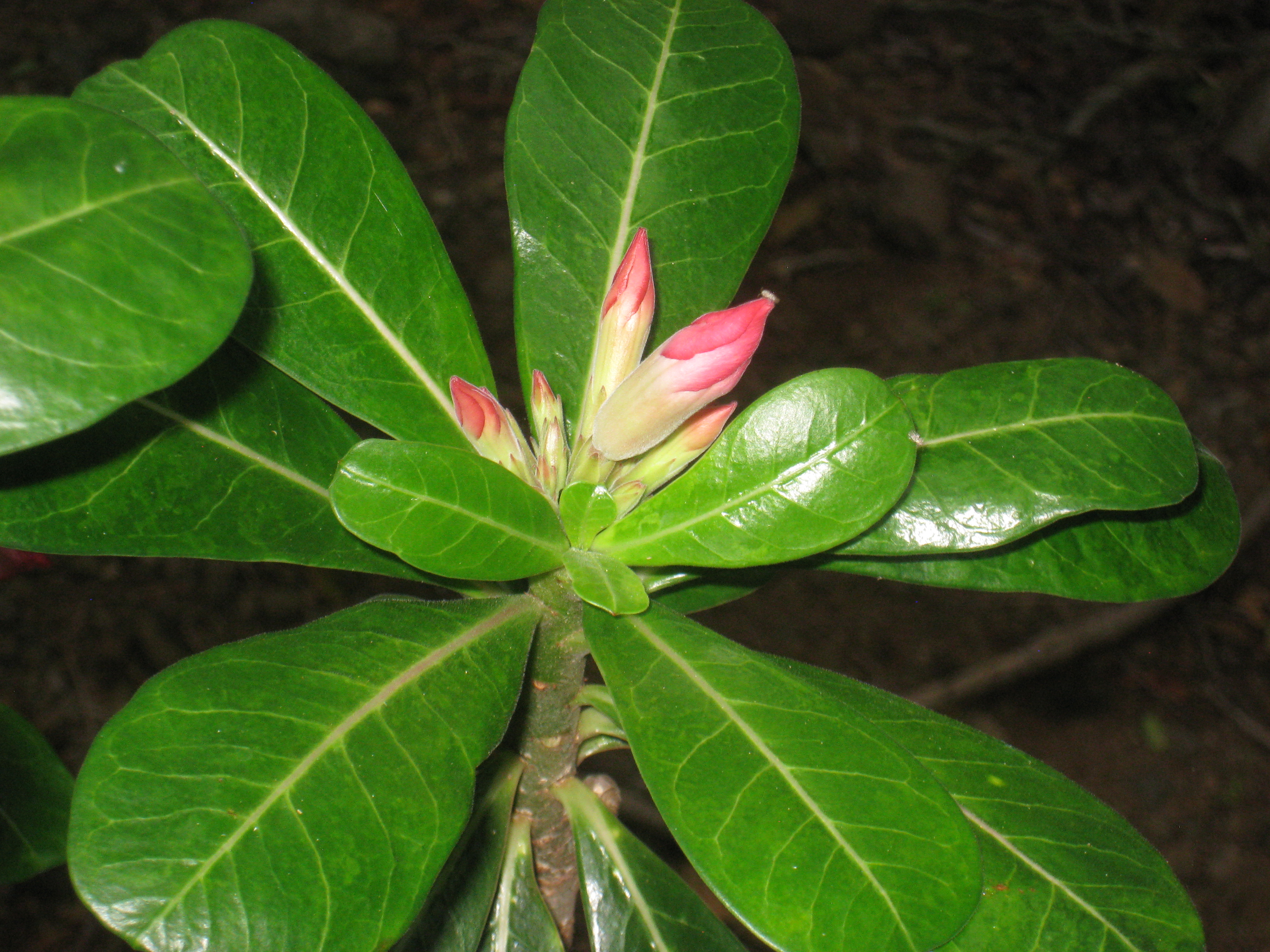 Adenium obesum in Koko Crater Botanical Garden, Honolulu, Hawaii, USA.